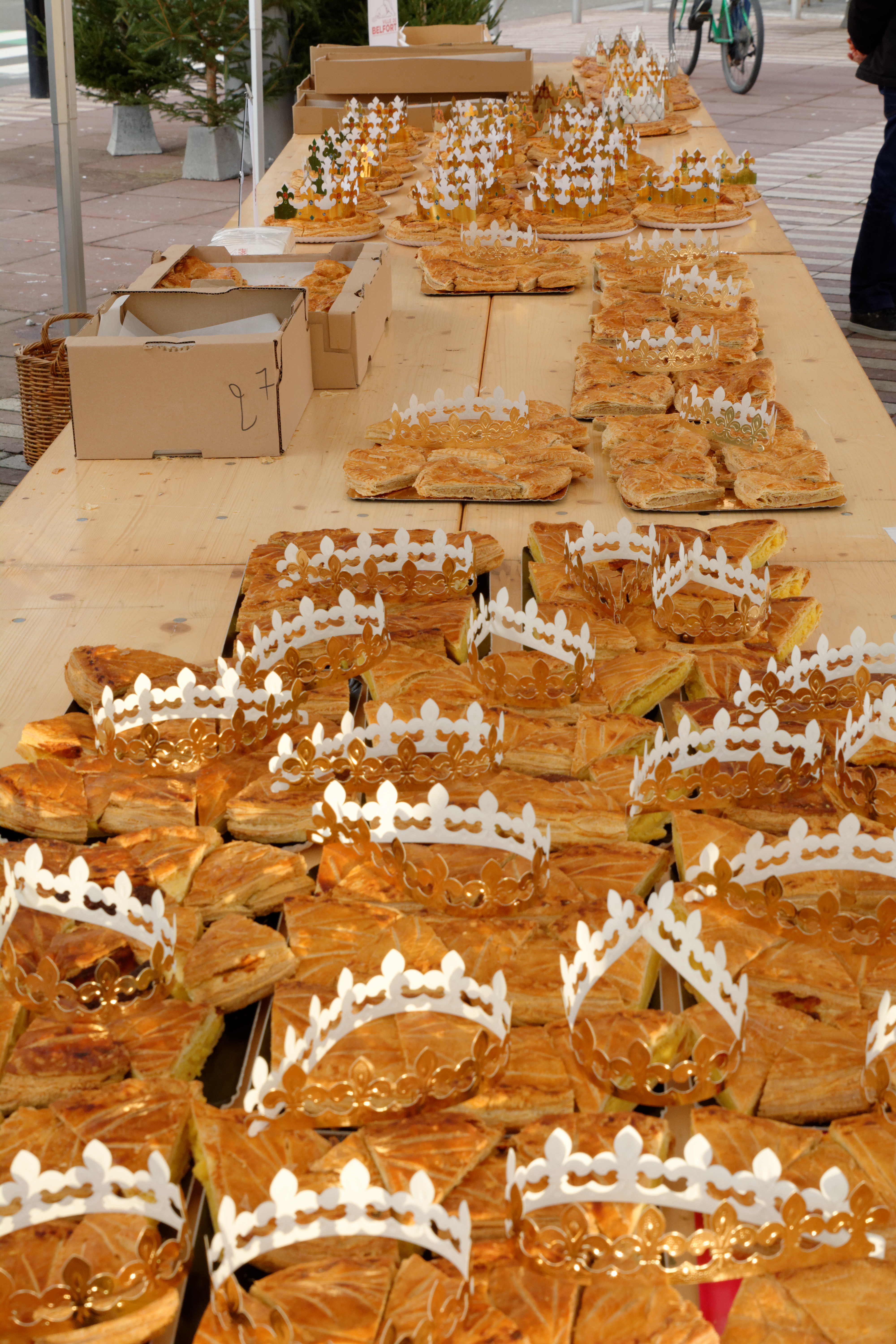 This image was taken with a Tamron SP AF 24-70mm F / 2.8 Di VC USD objective for Nikon digital single-lens reflex camera donated for photos by Wikimédia France. English | français | +/− Dans le cadre du mois givré, et pour terminer celui-ci, une dégustation de galettes des rois a eu lieu le 4 janvier, place Corbis, à Belfort : les galettes, prêtes à être mangées.